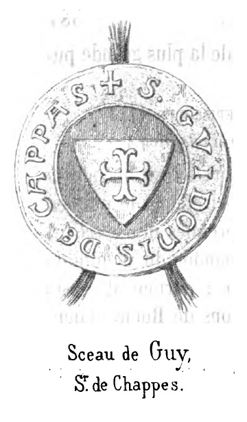 Sceau de Gui de Chappes, seigneur de Jully-sur-Sarce, par Monsieur Lucien COUTANT.